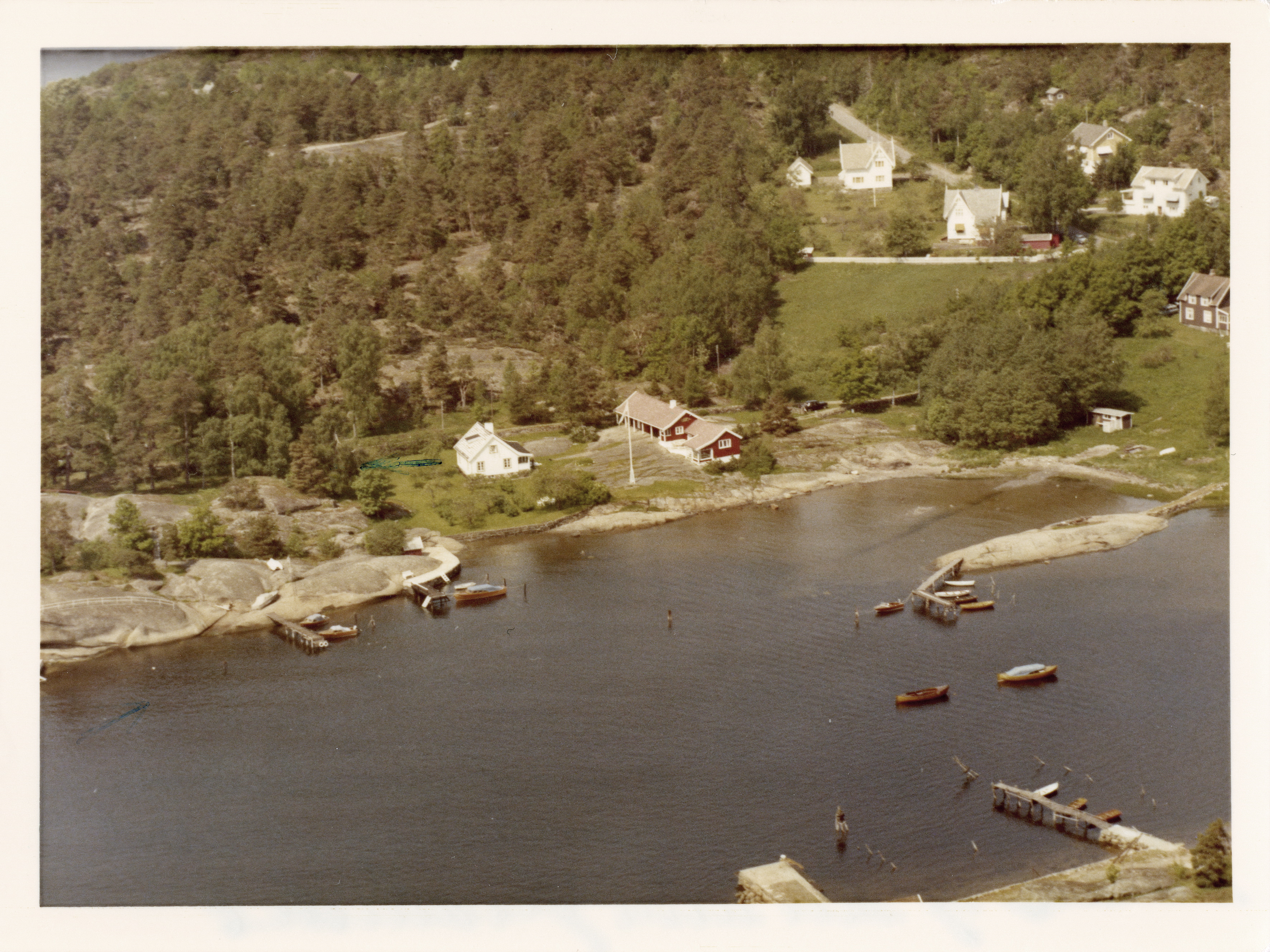 WF.S.164433